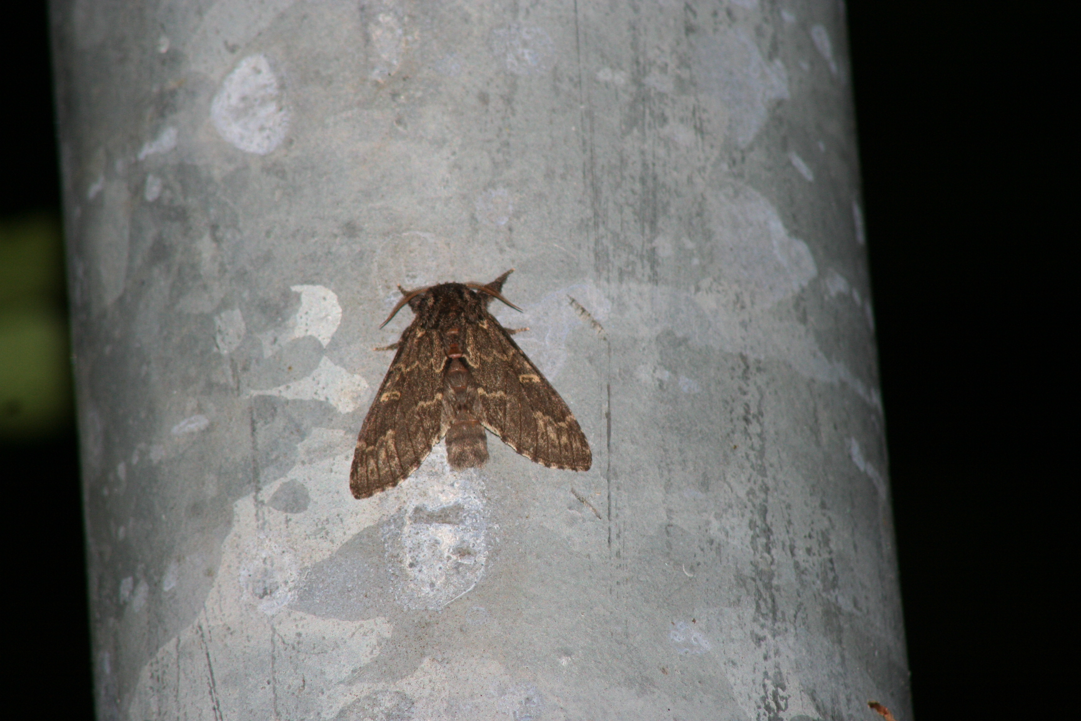 Adulter Notodonta torva